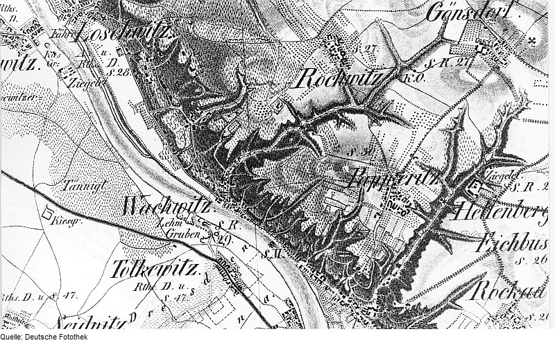 Original image description from the Deutsche Fotothek Dresden-Wachwitz und Rochwitz. Ausschnitt aus: Oberreit, Sect. Dresden, 1821/22